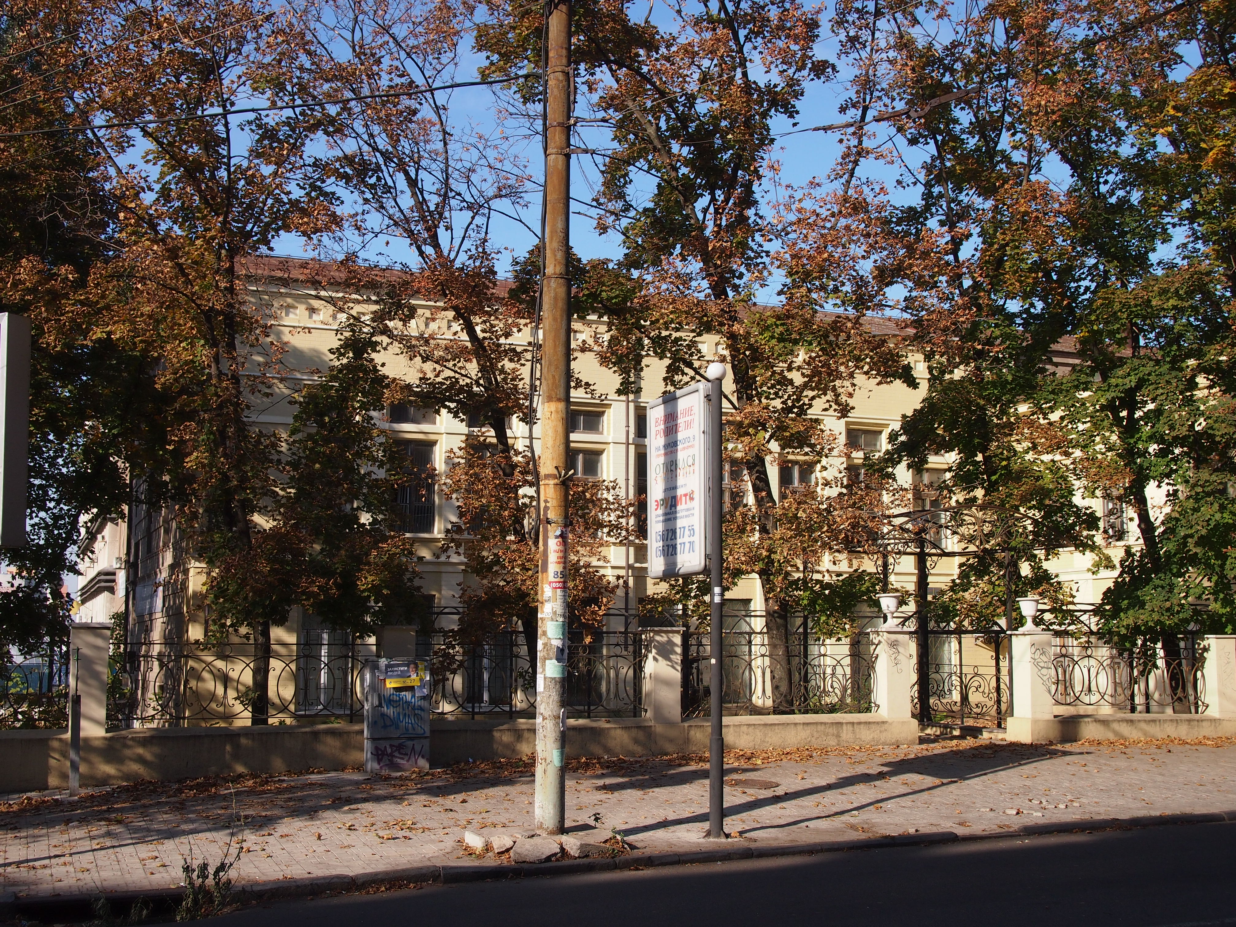 Комерційний клуб, Дніпропетровськ, Дзержинського вул., 23